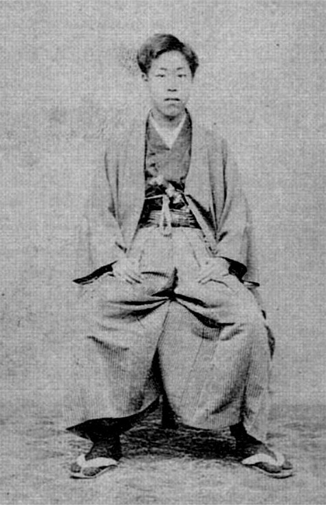 秋元礼朝の肖像写真。